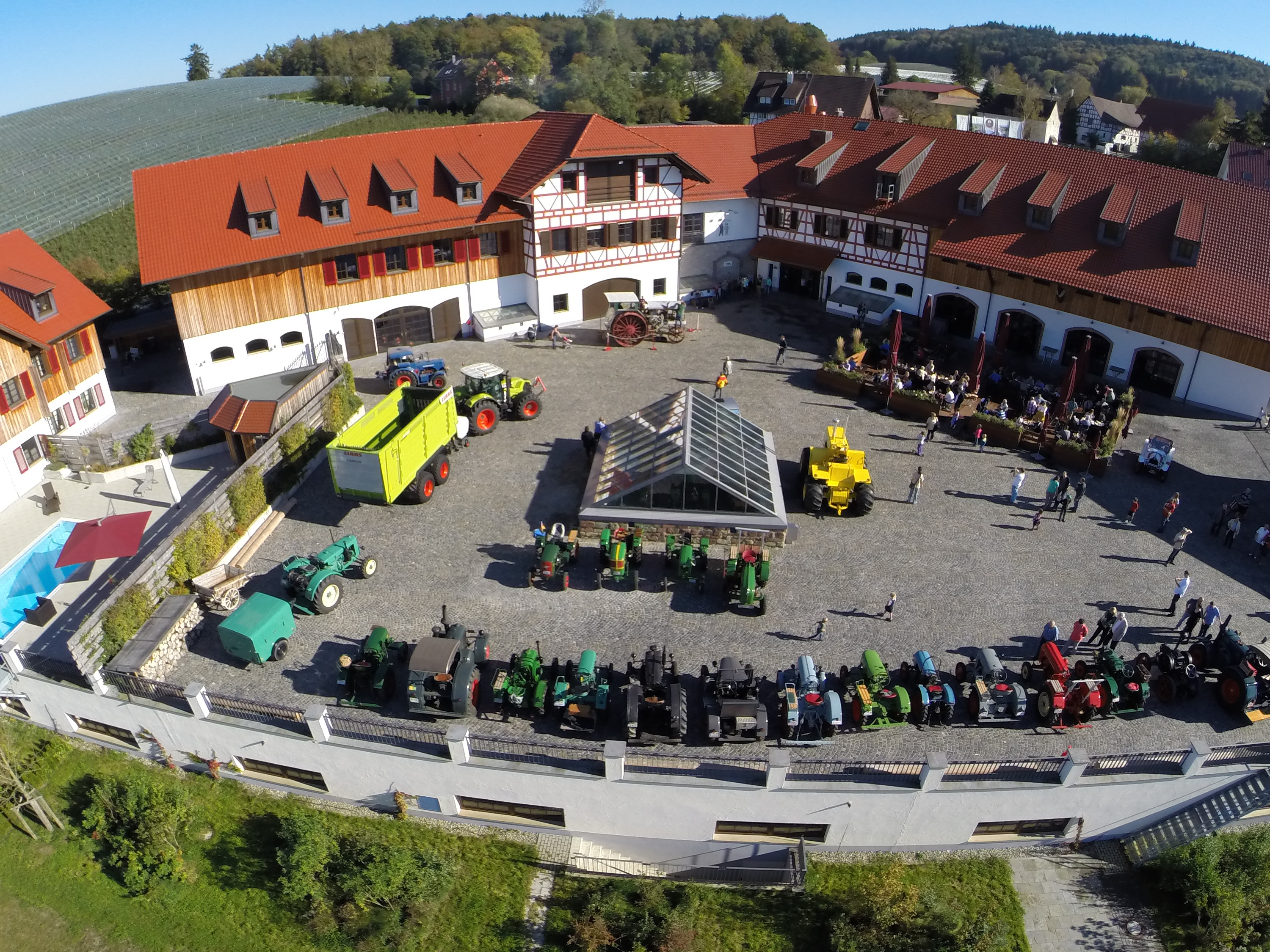 Innenhof des beliebten AUTO & TRAKTOR MUSEUM in Uhldingen-Mühlhofen am Bodensee.